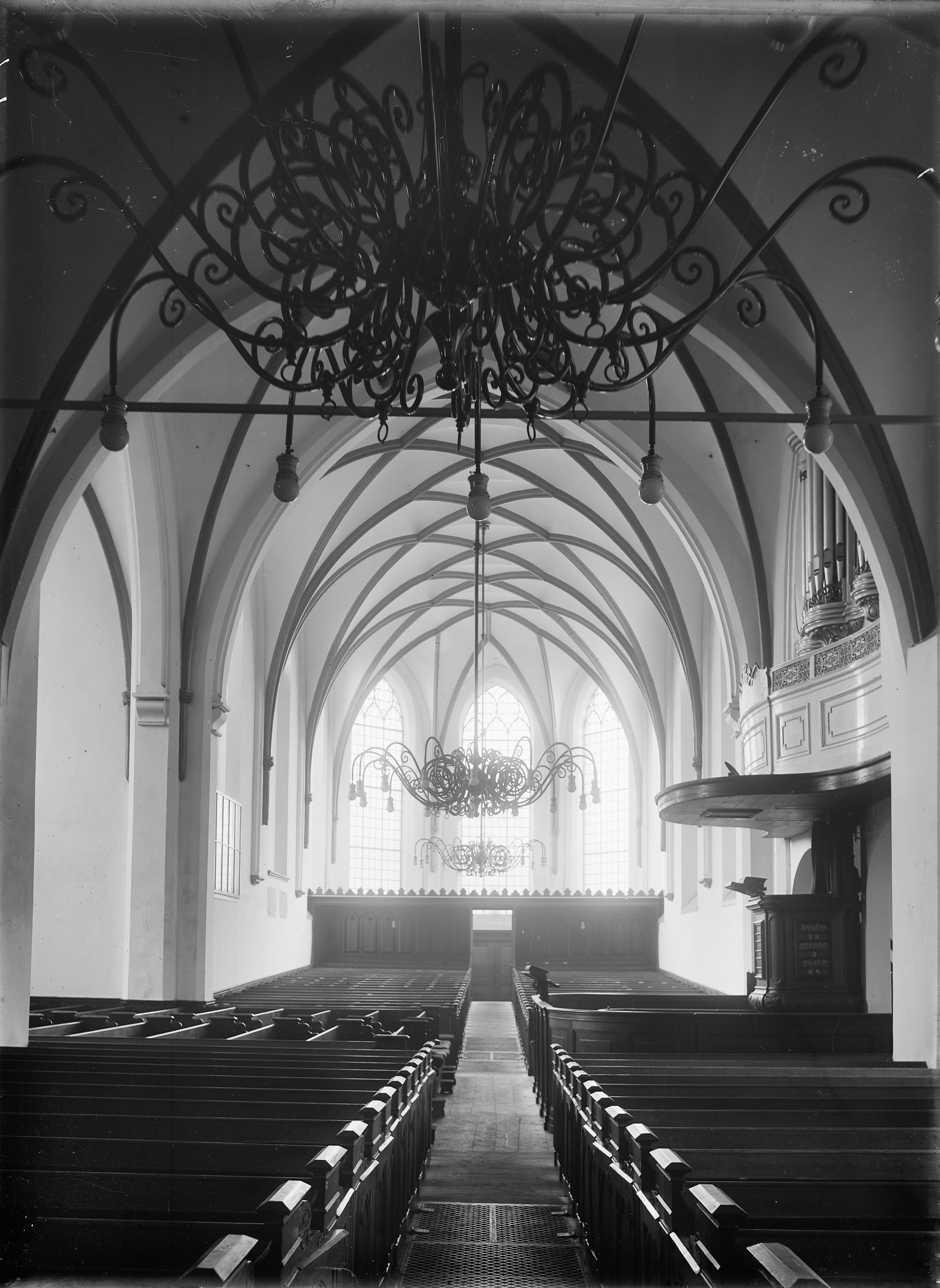 Nederlands Hervormde Kerk en Gemeentetoren: inwendig naar het oosten